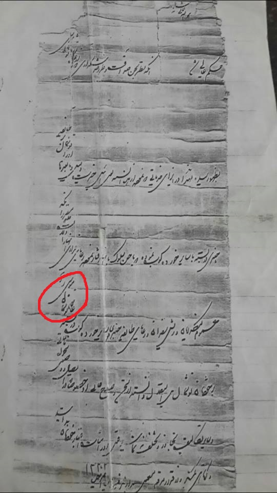 حکم عالی شاهانه از سوی شاهزاده محمد علی میرزا دولتشاه و فتحعلی شاه قاجار مبنی بر تمدید ریاست ایل ملکشاهی چمزی پهلوان موسی خمیس گرزدین وند در متن سند آمده است که به واسطه حسن سلوک و خدمات ارزنده عالیجاه توشمال موسی از این به بعد تمامی توشمالان و کدخدایان و ریش سفیدان و رعایای طوایف چمزی احکام وی را بر خود لازم دانسته و ملزم به اجرای آن هستند و تجاوز از احکام عالیجاه توشمال موسی همانند تجاوز از حکم شاهزاده و شاه قاجار است. تاریخ سند 1222 هجری قمری برابر با سال 1185 خورشیدی